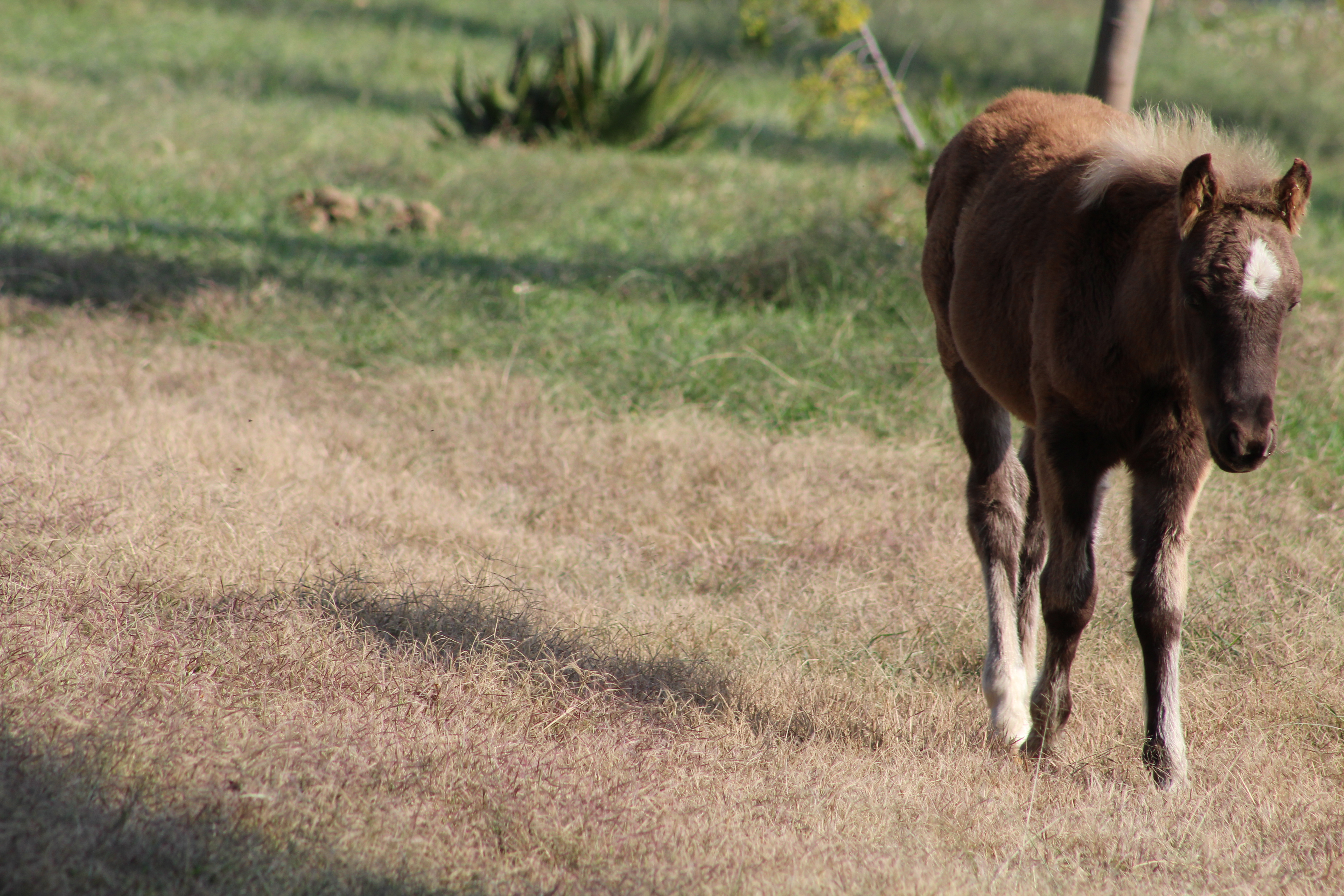 Poni caminando alrededor del lago.